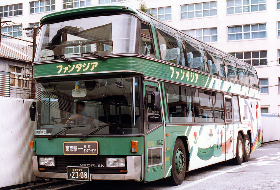 東京空港交通 ファンタジア ネオプラン スカイライナー N122/3.